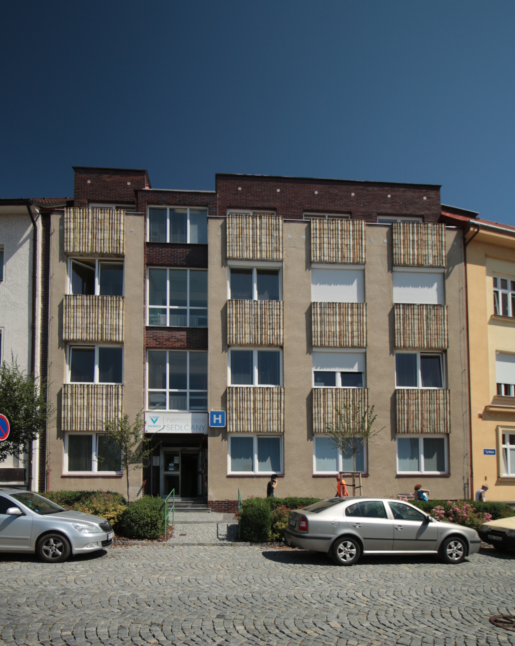 Sedlčany, Tyršova ulice